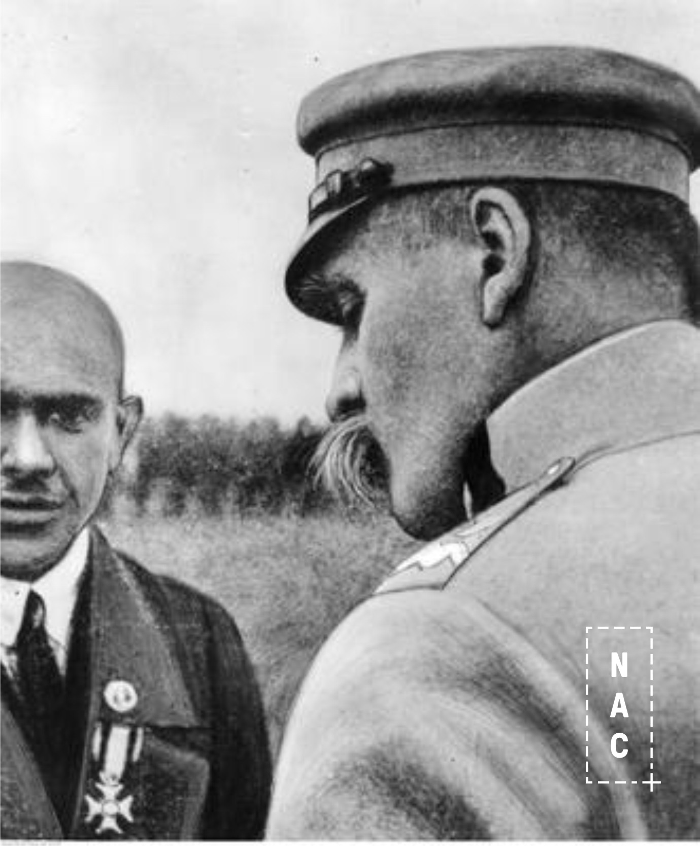 Dekoracja oficerów 30 Dywizji Piechoty, weteranów byłej Brygady Syberyjskiej w drugą rocznicę powrotu do Polski. Marszałek Józef Piłsudski odznacza płk. Kazimierza Rumszę.